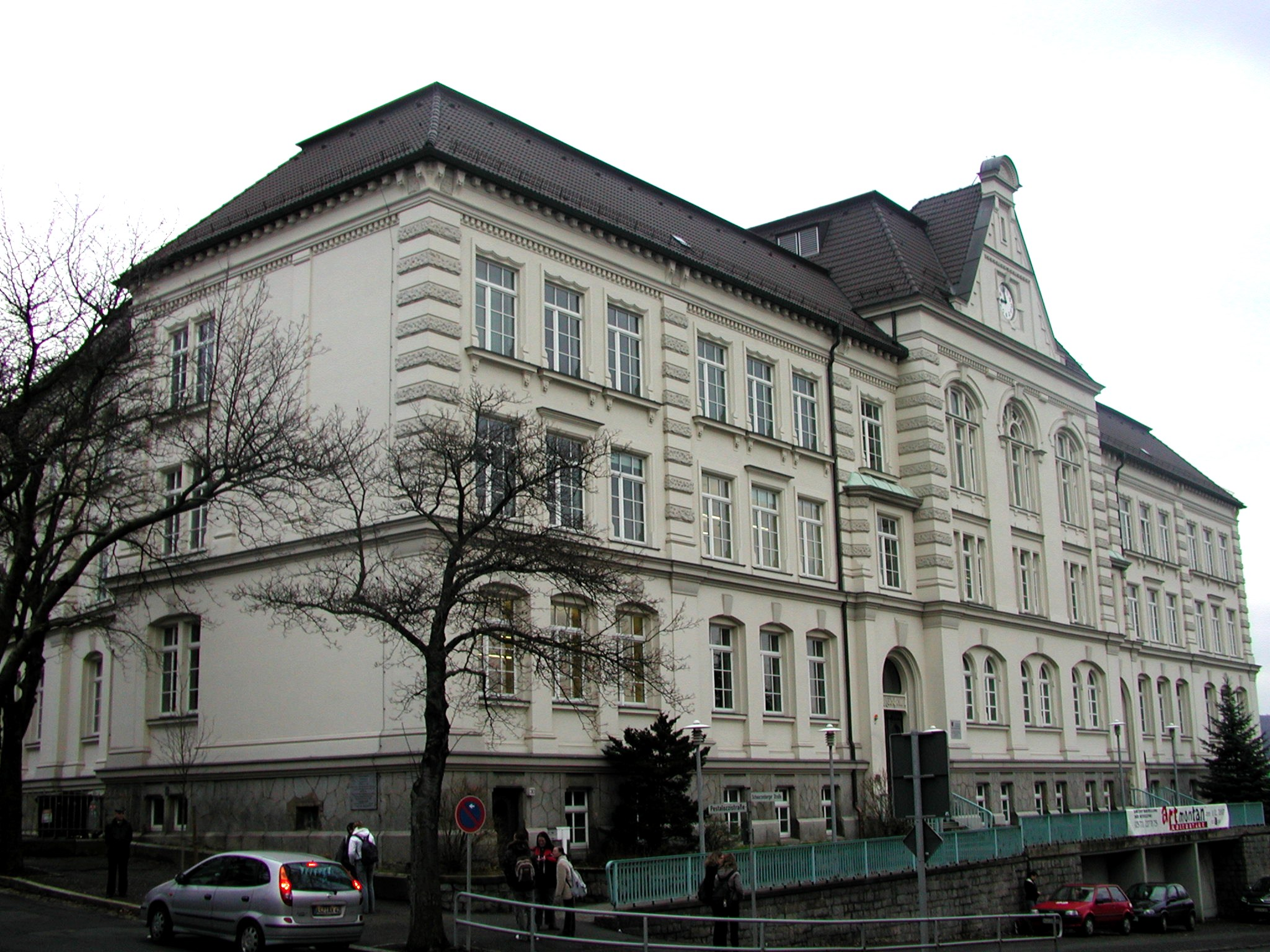 Die Pestalozzischule in Aue